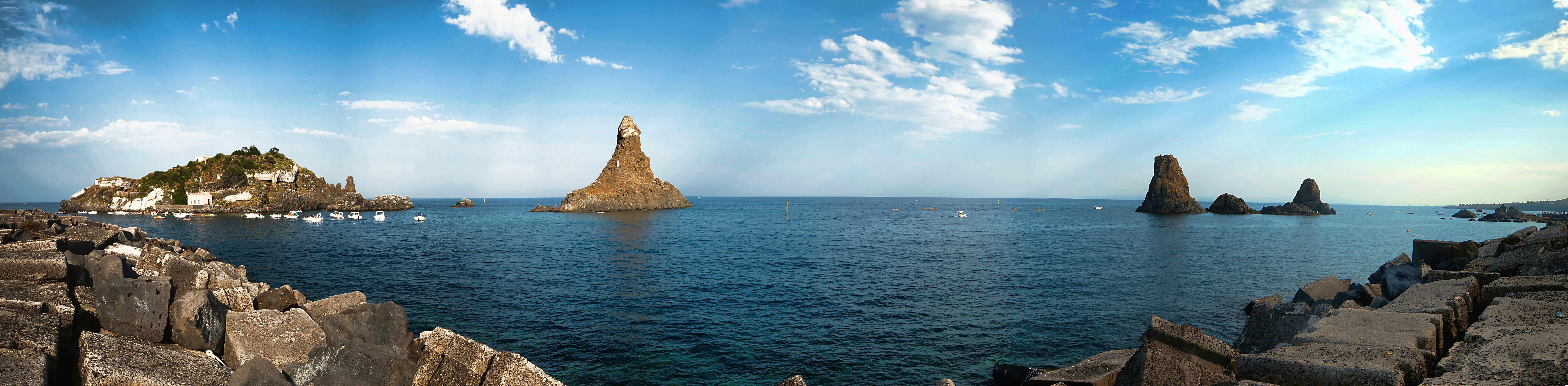 View On Black - Fluidr